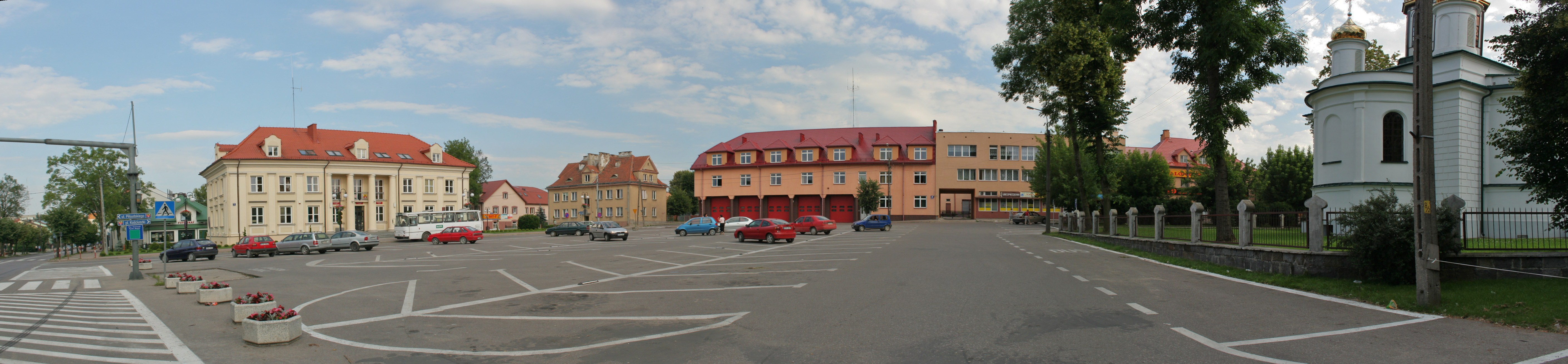 Plac Kościuszki w Sokółce.